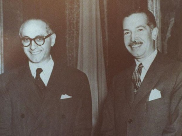 El presidente Arturo Frondizi (1958-1962) con el gobernador de Salta de la UCRI Bernardino Biella (1958-1962).